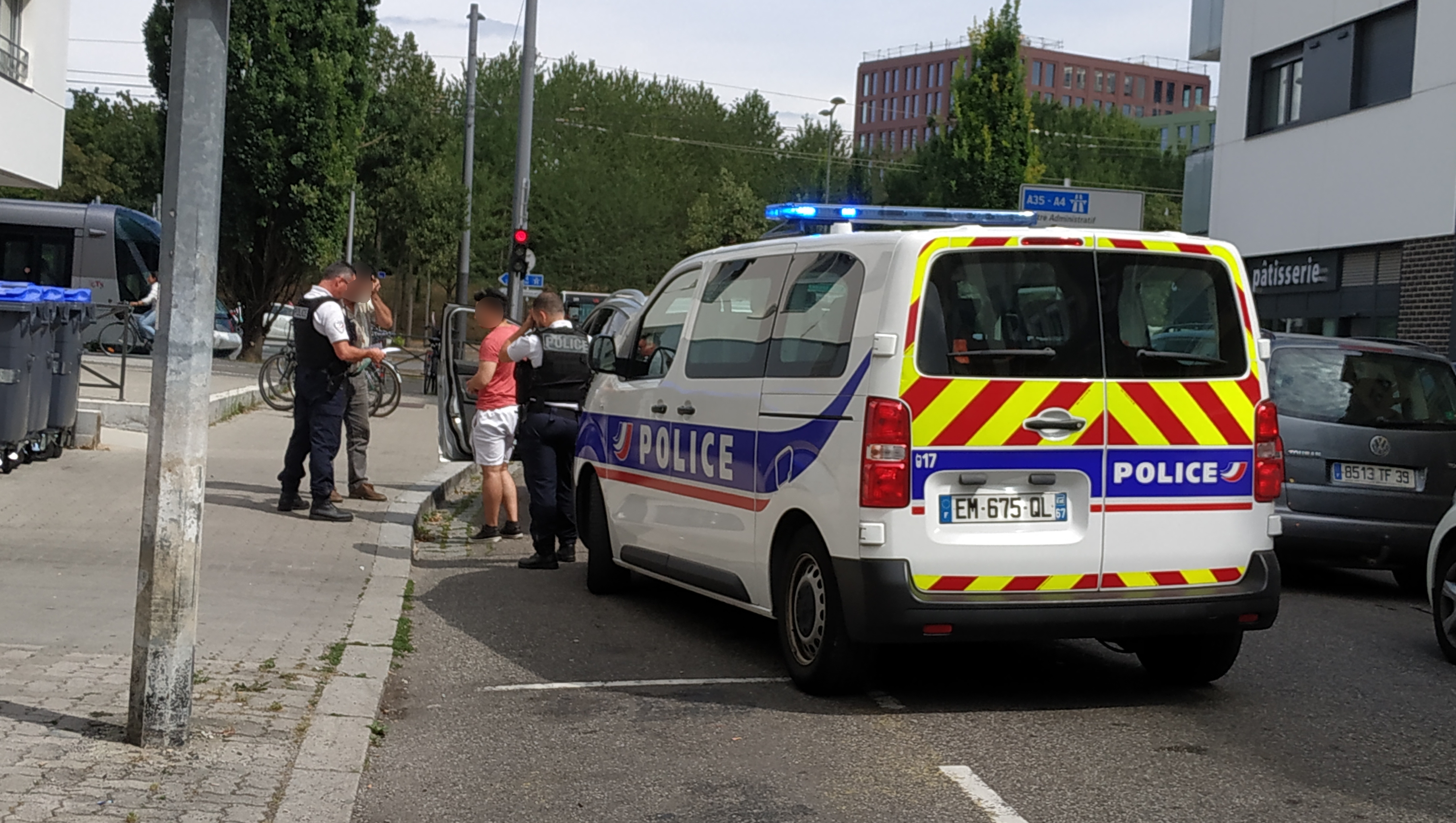 Policiers et Peugeot Traveller de la police nationale arrêtant un véhicule à Strasbourg